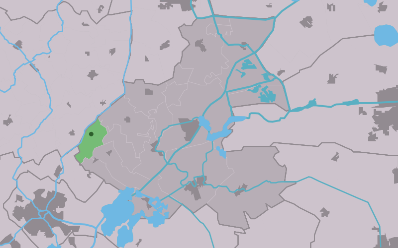 Kaartsje fan himrik fan Dearsum